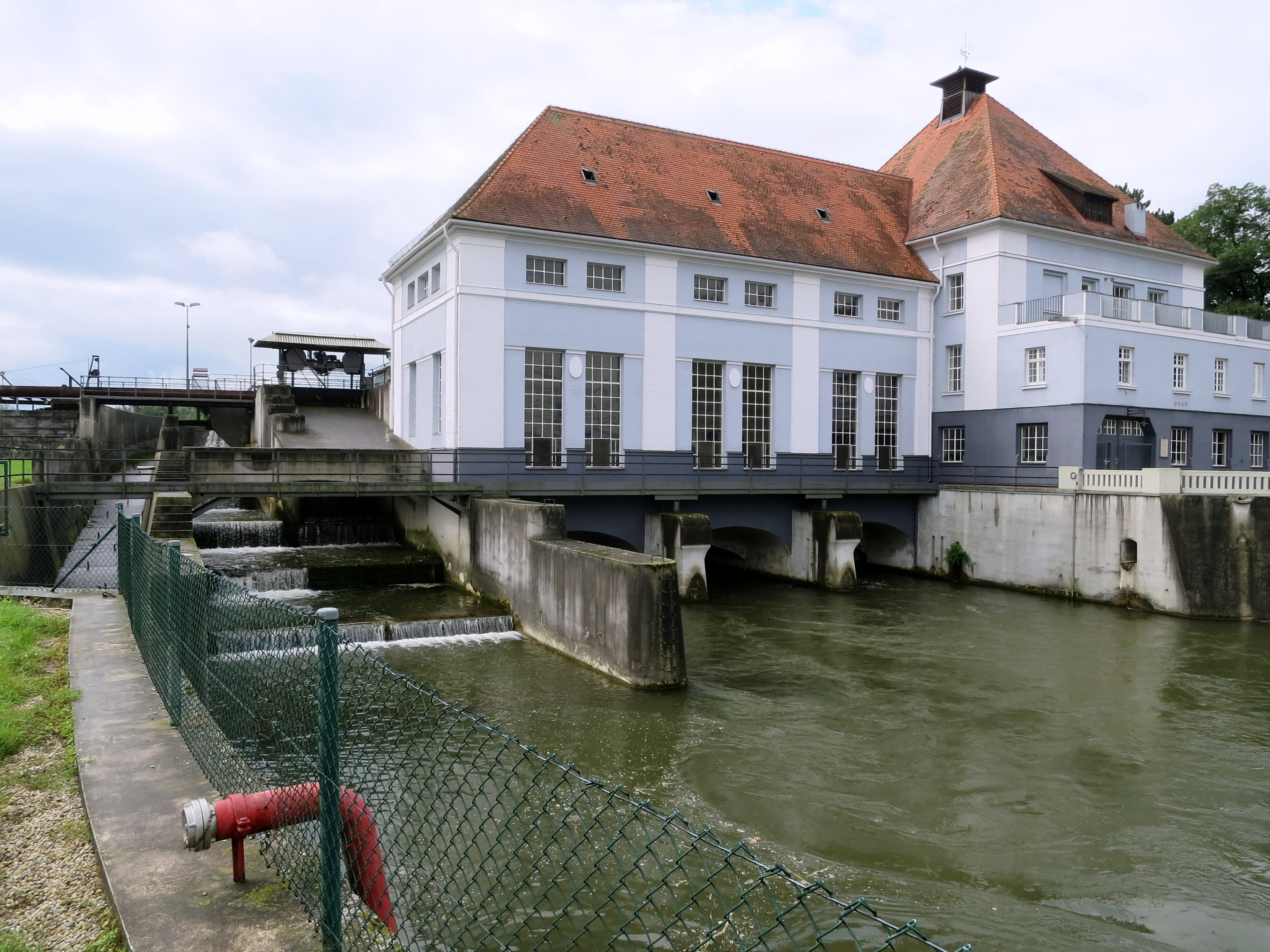 Ein über 100 Jahre altes Wasserkraftwerk, das in Privatbesitz ist und saubere Energie liefert.